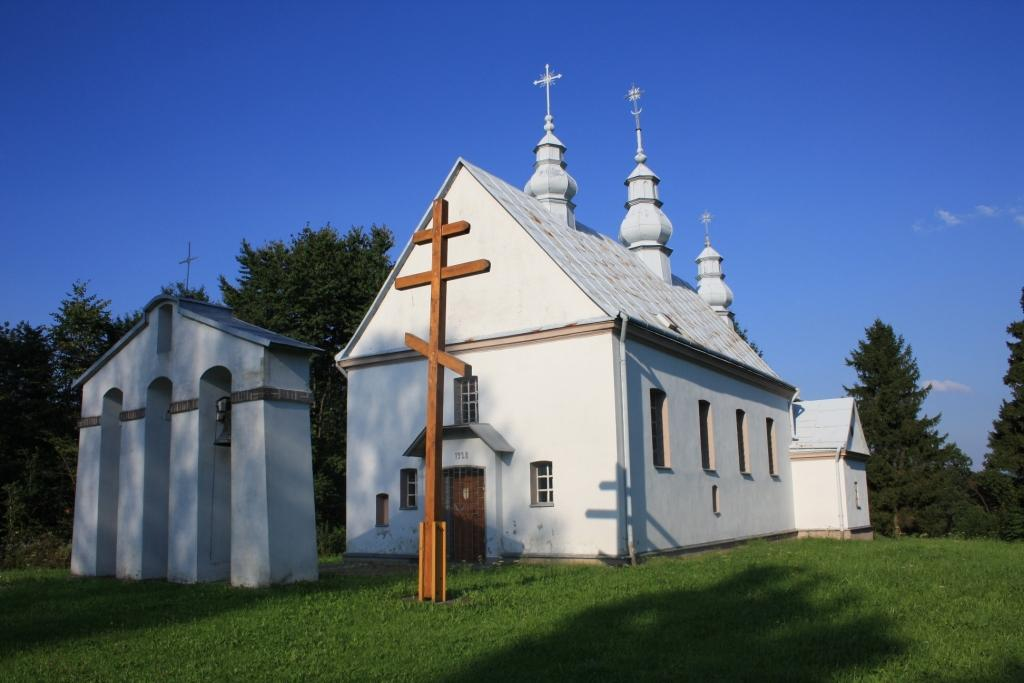 Cerkiew p.w. Narodzenia NMP w Dziurdziowie